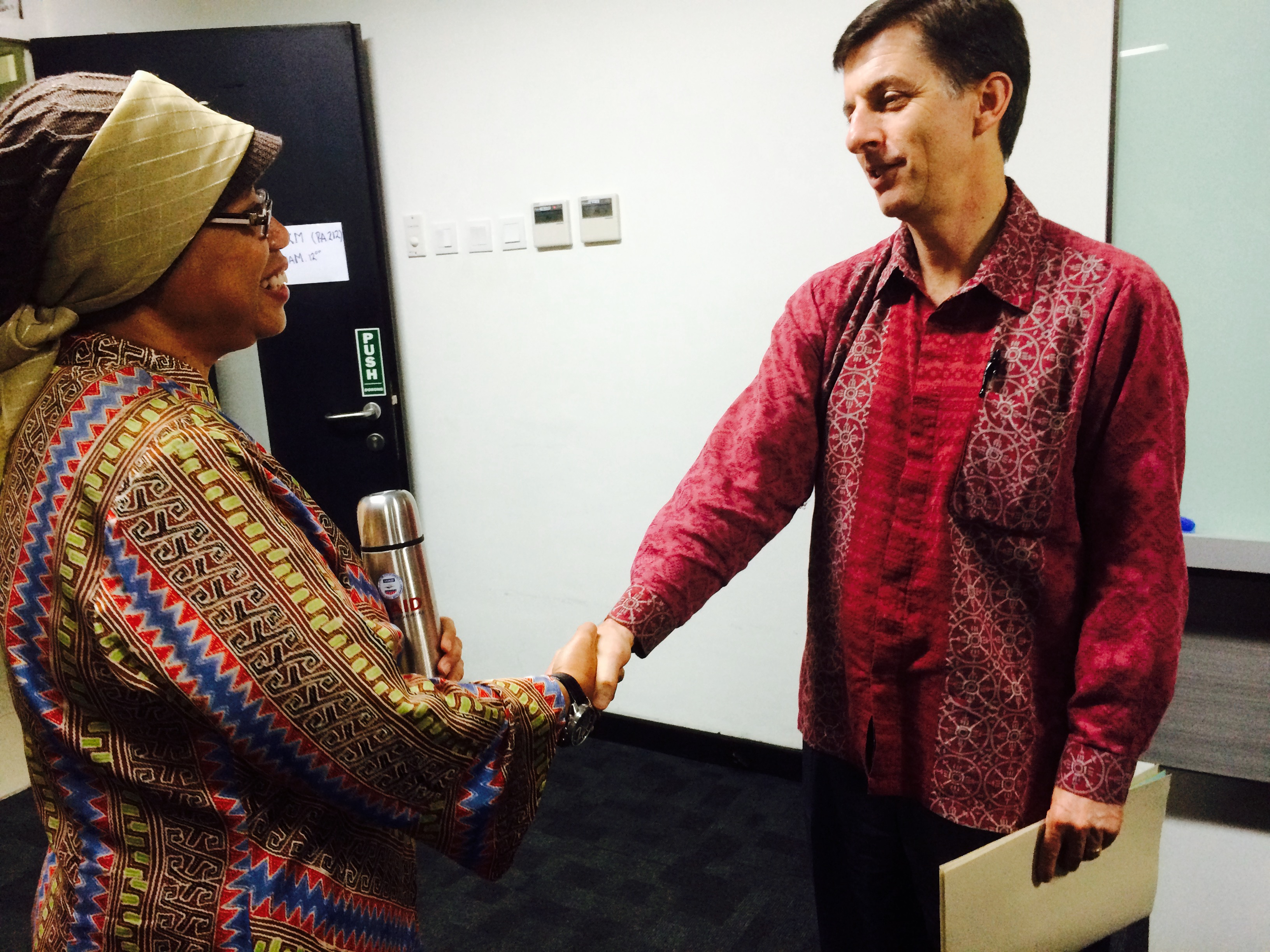 Direktur USAID/indonesia Dr. Andrew Sisson berjabat tangan dengan Dekan Fakultas Kesehatan Masyarakat Dr. Agustin Kusumayati, M.Sc., Ph.D. Fakultas Kesehatan Masyarakat, Universitas Indonesia merupakan penerima hibah PEER bidang kesehatan untuk studi tentang pengembangan sistem rujukan menggunakan Asuhan Ibu Kangguru bagi bayi berat lahir rendah. USAID Mission Director Dr. Andrew Sisson with the Dean of the School of Public Health Dr. Agustin Kusumayati, M.Sc., Ph.D. The School of Public Health University of Indonesia is the recipient of the PEER Health Award on Developing a referral system using Kangaroo Mother Care for low birth weight babies. Photo credit: USAID/Indonesia